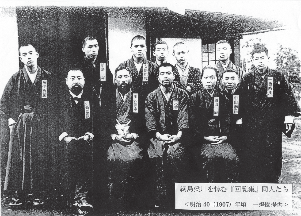 綱島梁川を悼む『回覧集』同人たち＜明治40（1907）年頃 一燈園提供＞ 近角常観、川合信水、西田天香、西山庵、中山泰昌、一色醒川、魚住折蘆、前島潔、安倍能成